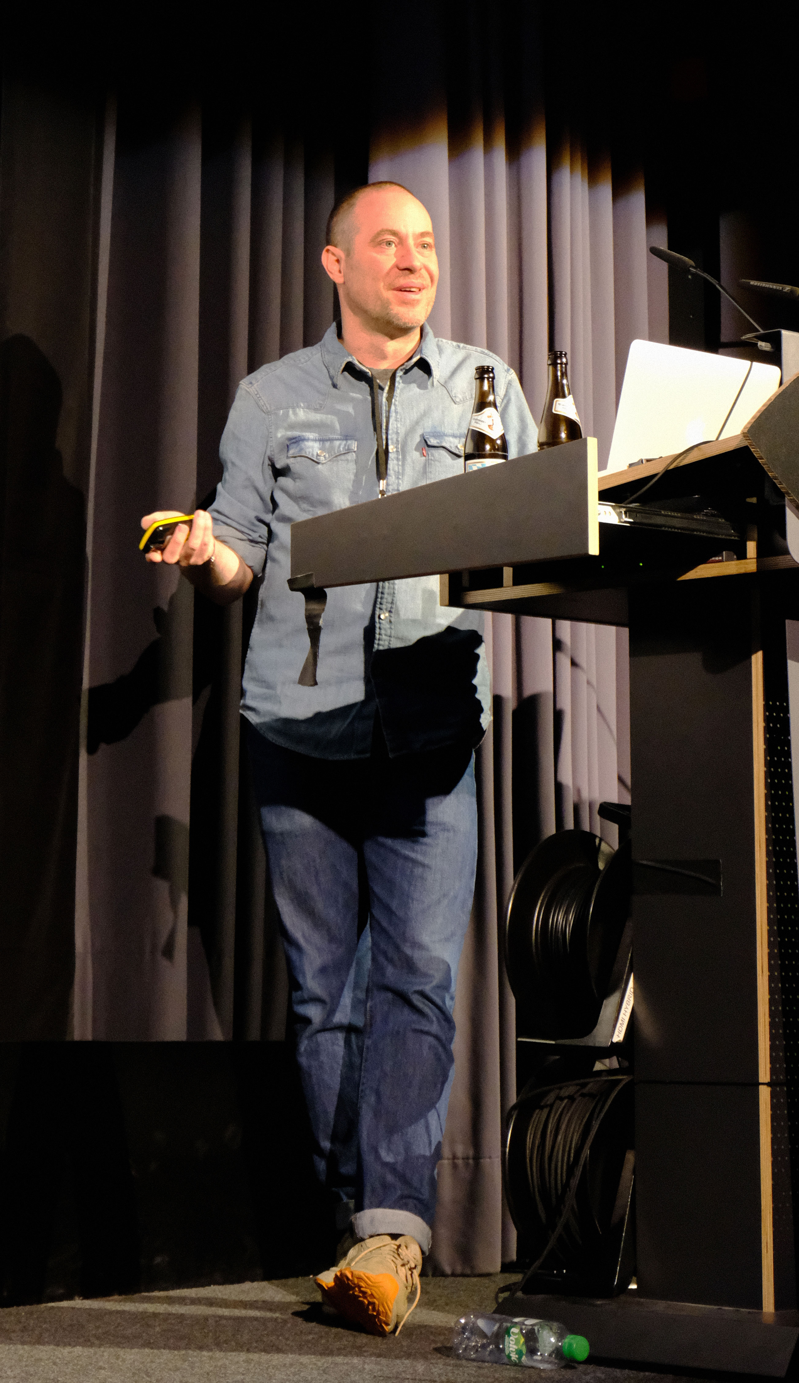 Der Grafik-Designer Mirko Borsche auf dem Forward Festival in München (2020)